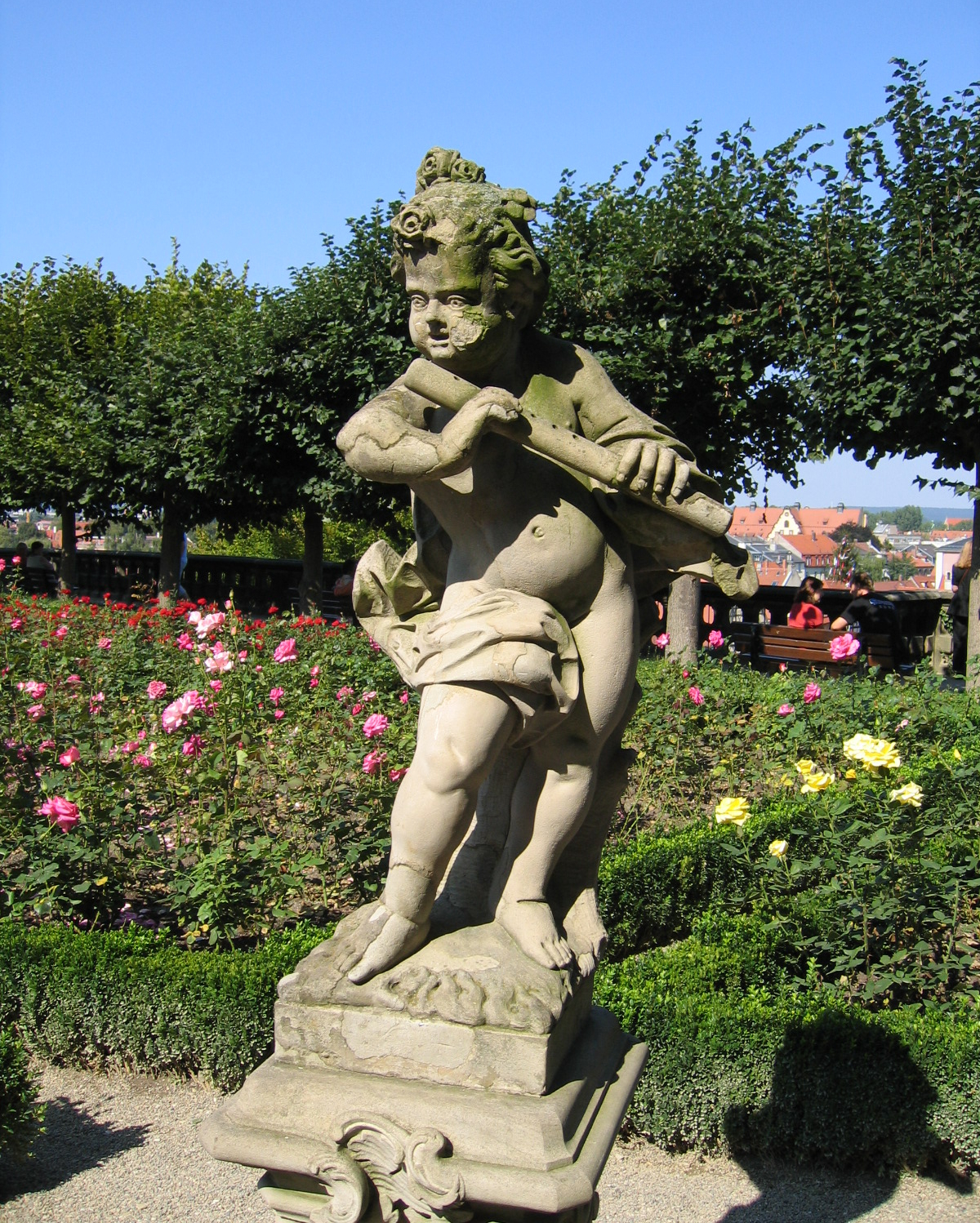 Description: Skulptur von 1760/61 des Bamberger Hofbildhauers Ferdinand Titz im Rosengarten der Neuen Residenz in Bamberg (Germany) Source: selbst fotografiert Date: 4. Sept. 2005 Author: Asio otus